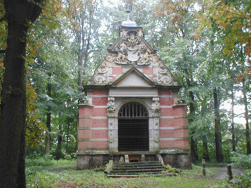 Mausoleum der Grafen Grothe in Varchentin, Landkreis Müritz, Mecklenburg-Vorpommern, Deutschland